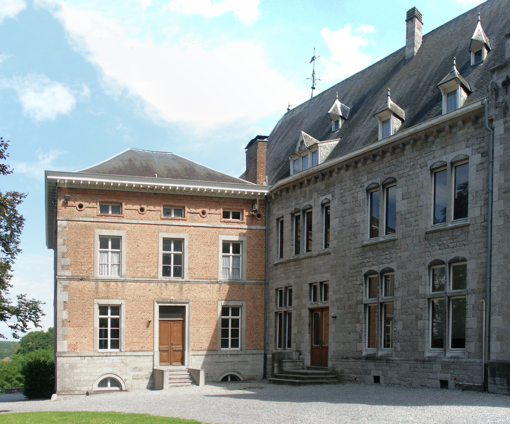 Das sogenannte Château neuf oder Château Cousin in Rochefort, Belgien This image was created with Hugin